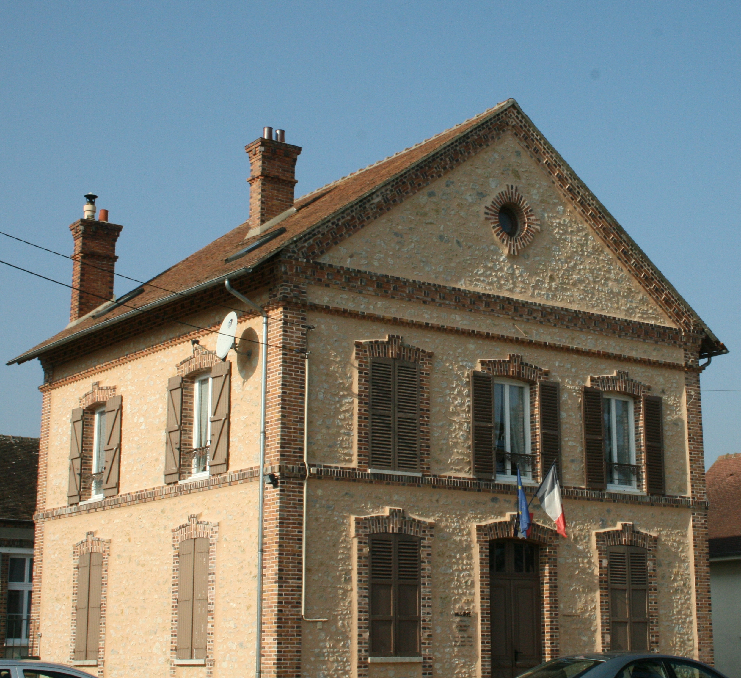 Photo de la Mairie.